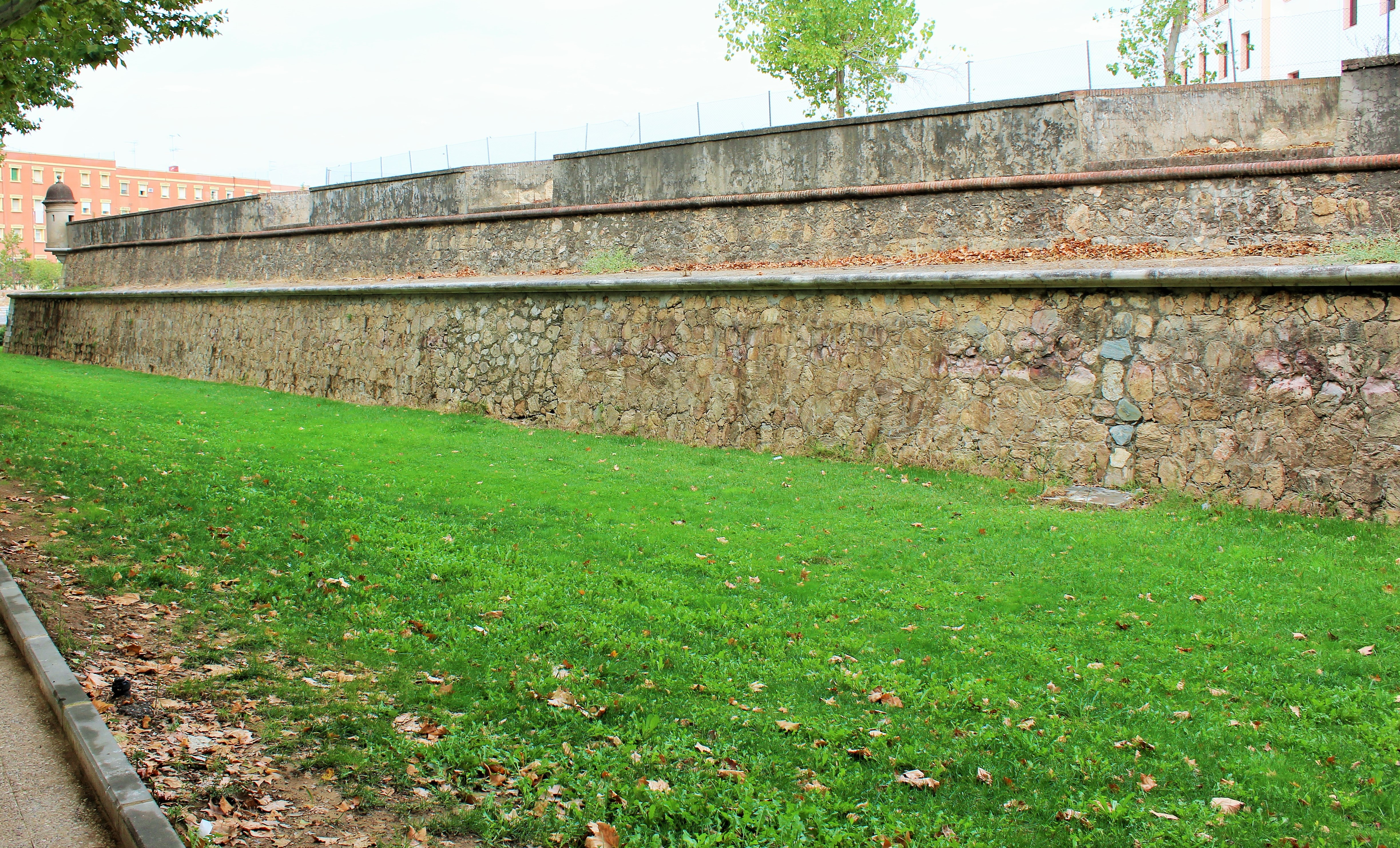 Lienzo sur y garita al fondo.